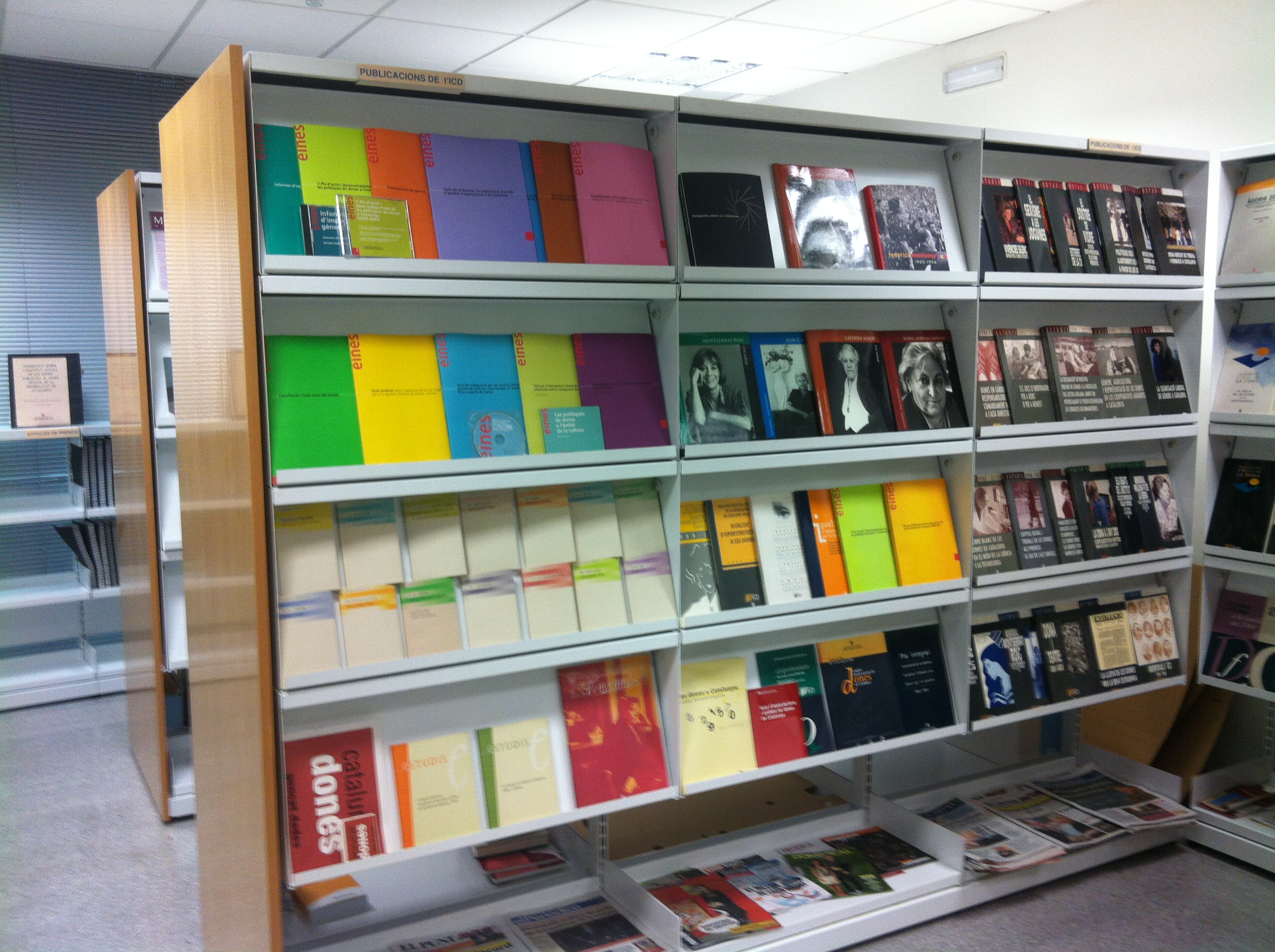 Biblioteca de l'Institut Català de les Dones